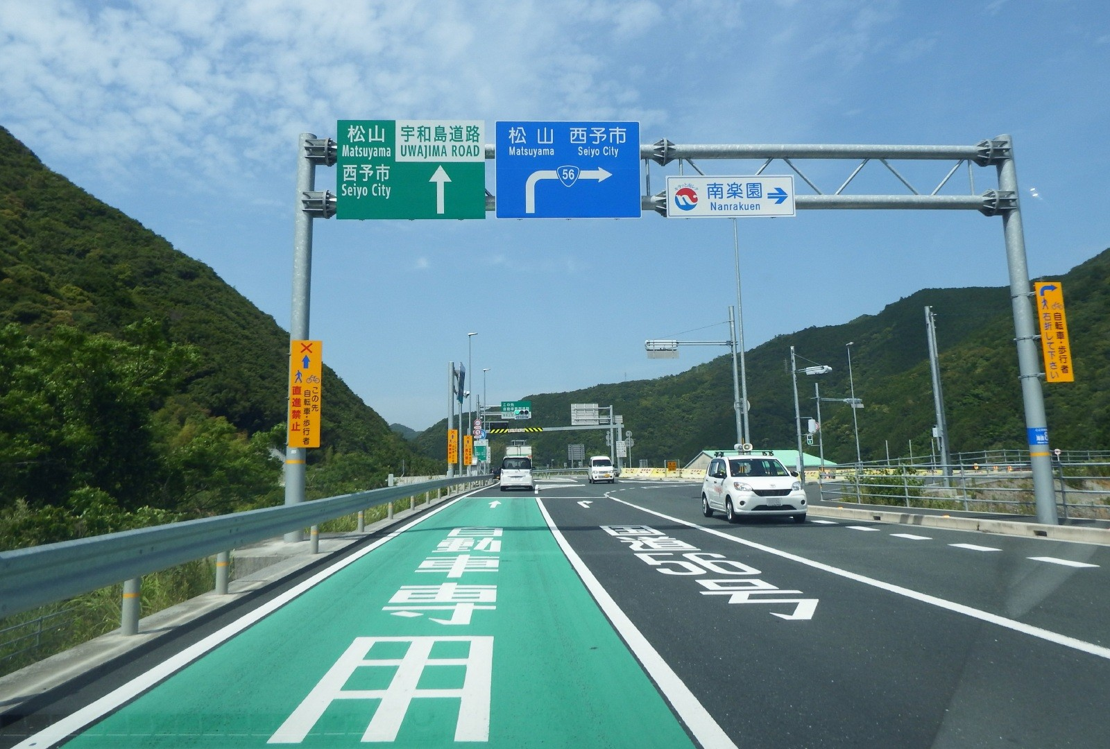 津島岩松インターチェンジ